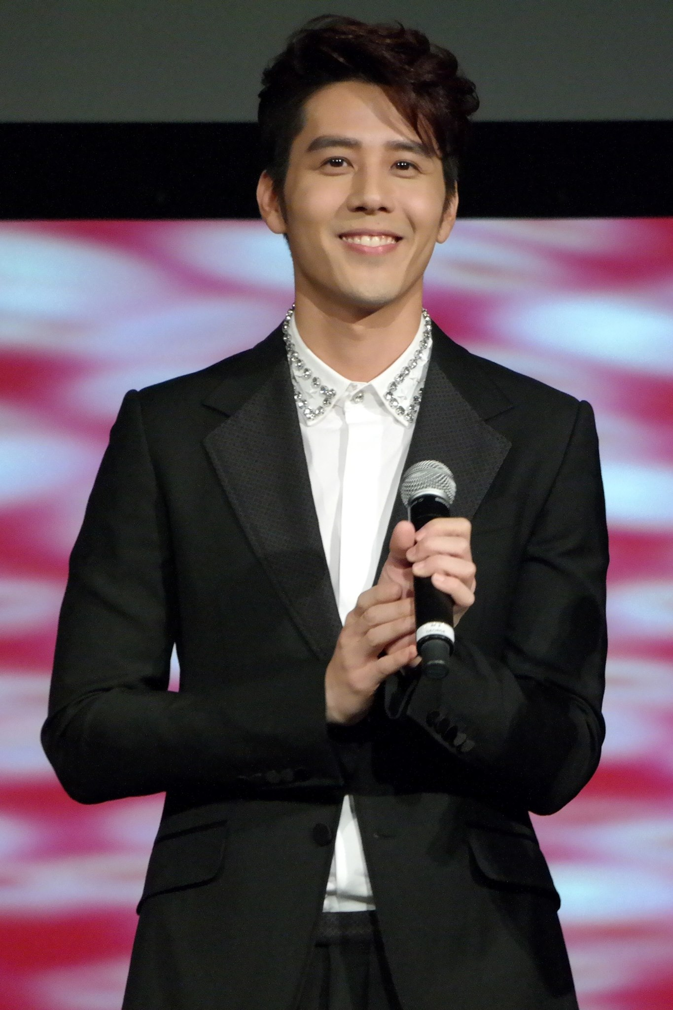 第三屆DramaFever頒獎典禮主持人胡宇威